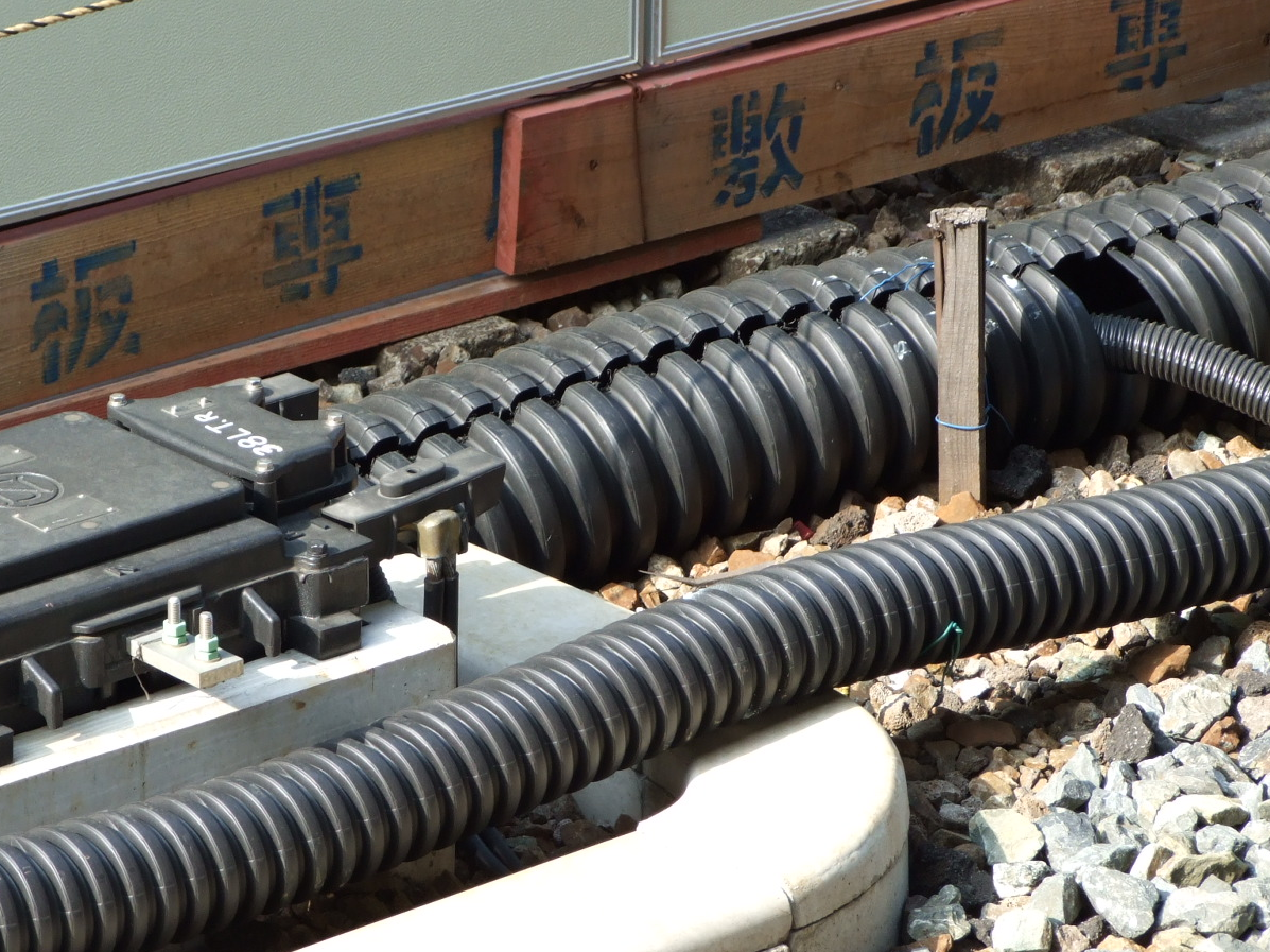 Plastic_Pipe,HDPE